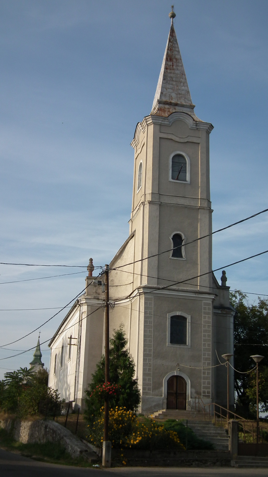 Református templom (Emőd, Kossuth u. 47.) This is a photo of a monument in Hungary. Identifier: 2731